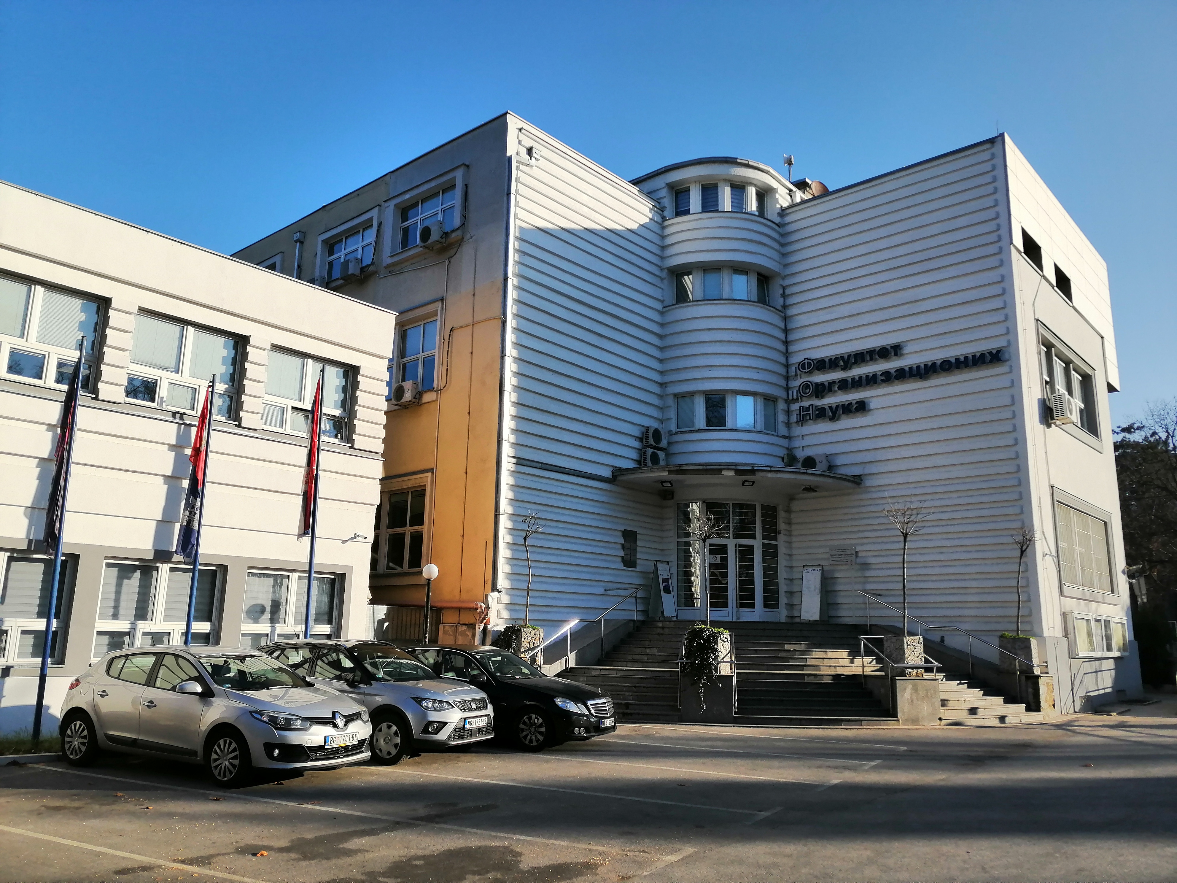 Fakultet organizacionih nauka, Beograd